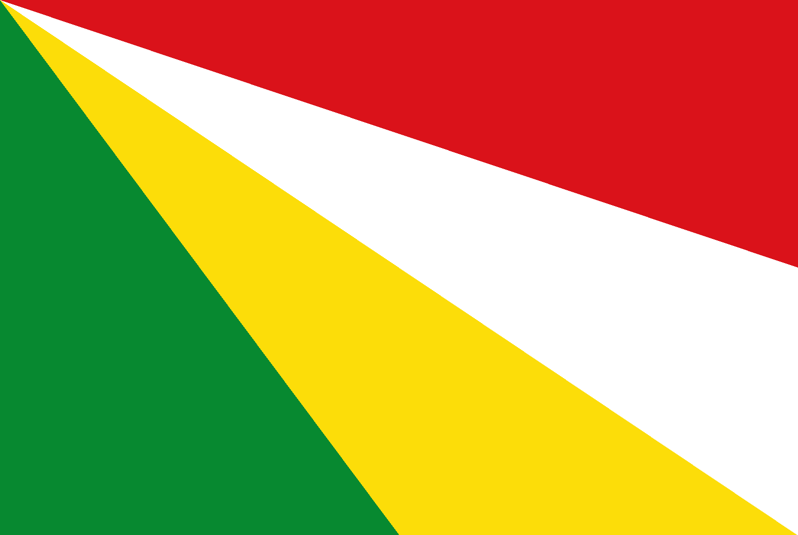 Bandera de la provincia de Grau y del distrito de Chuquibambilla - Apurímac